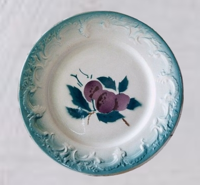 Assiette en faïence de Castres, décor de prunes, France, début XXe siècle